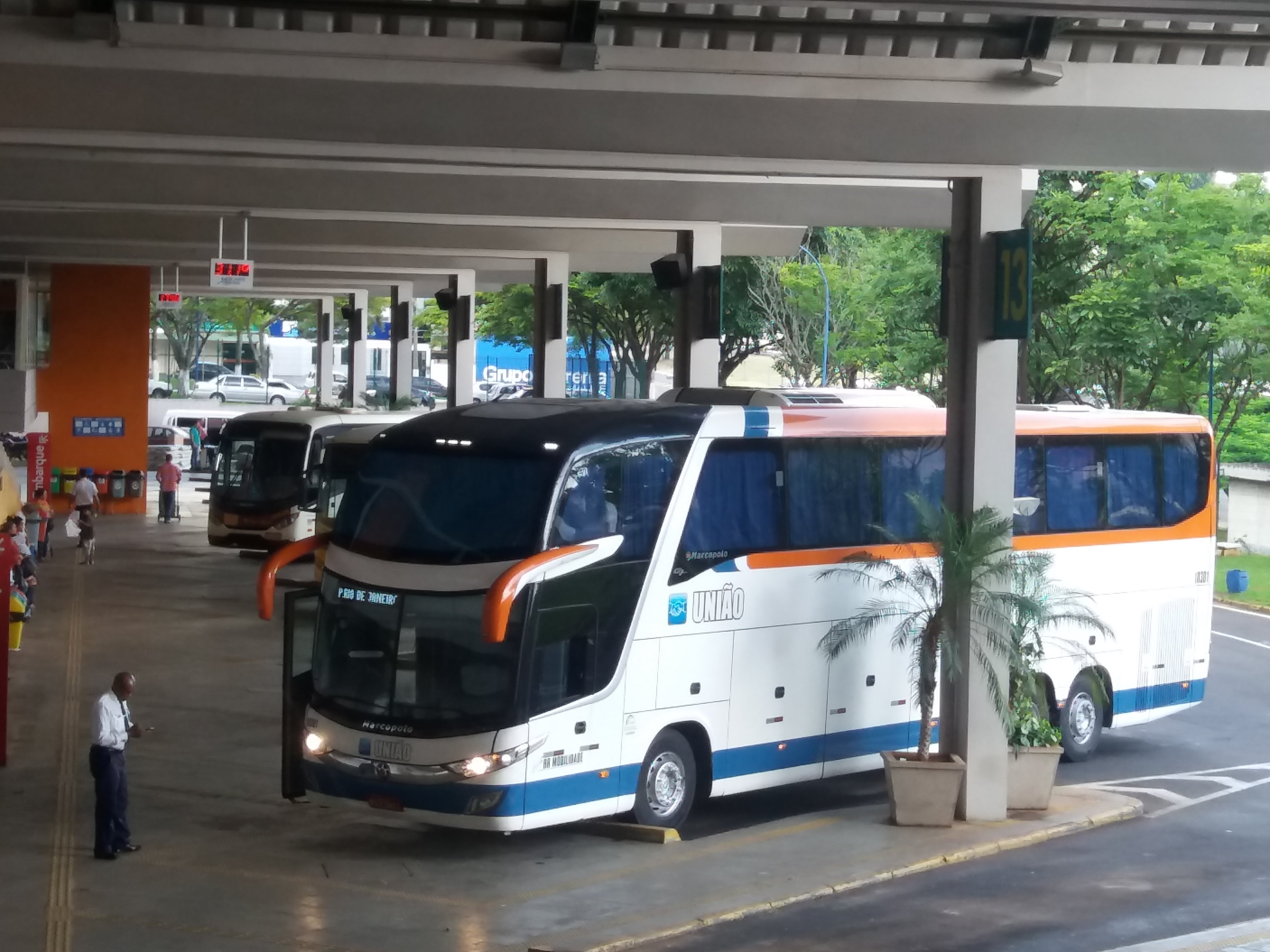 Rodoviaria de Franca, Franca (SP), Brazil